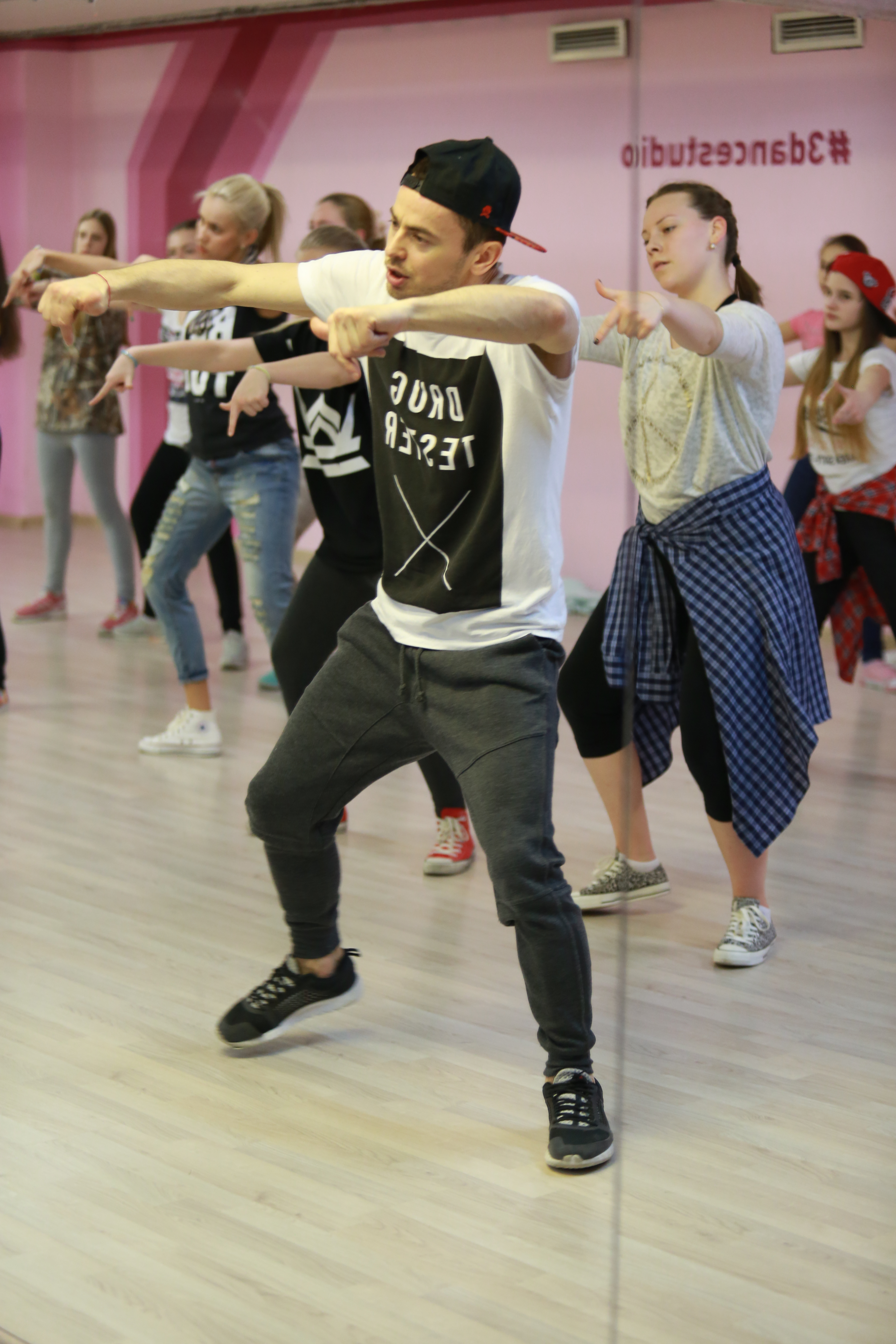 Мастер класс Ильшата Шабаева